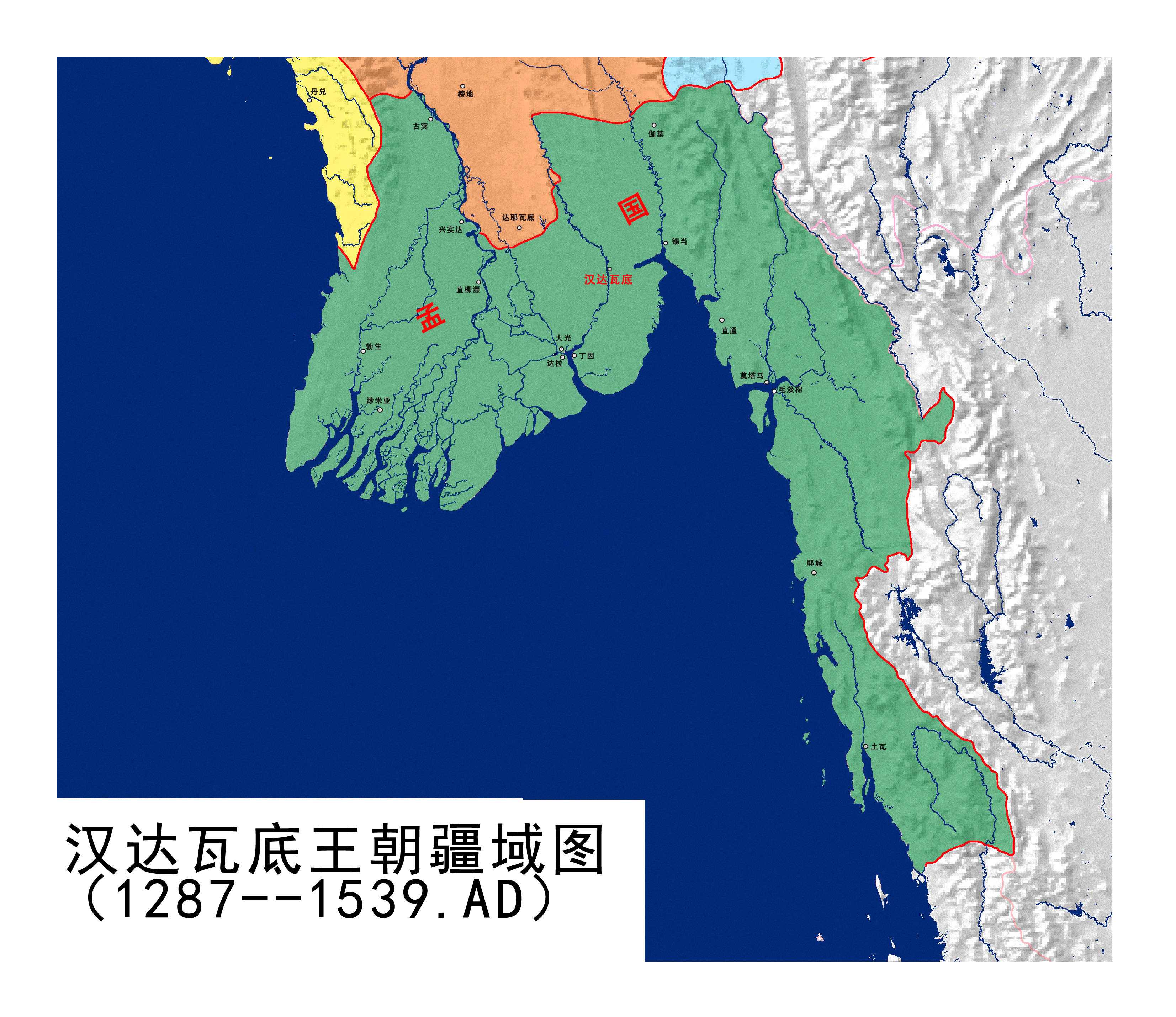 孟国疆域